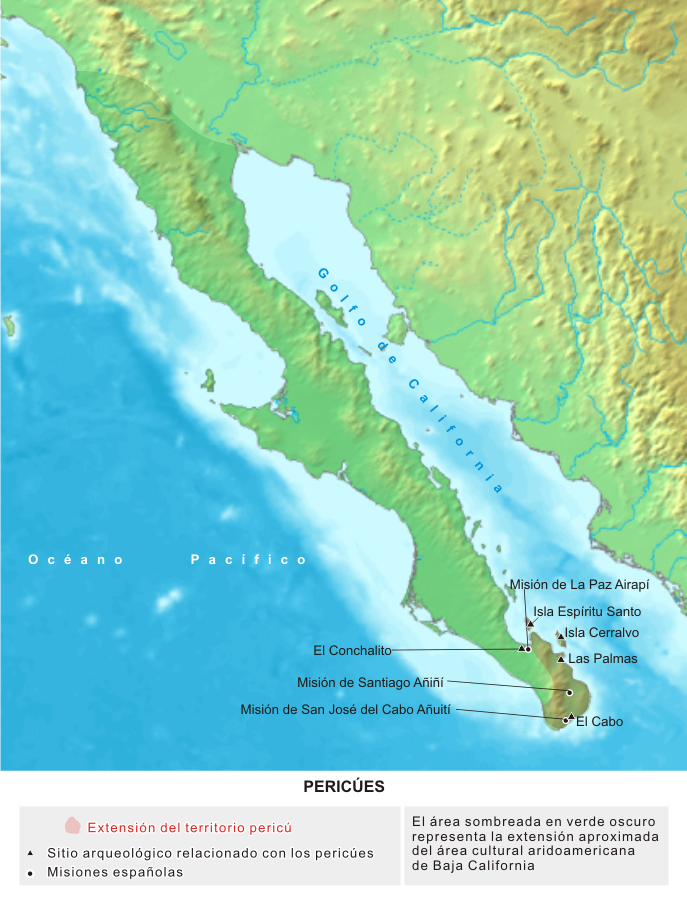 Mapa de localización del territorio pericú, en la península de California (México)